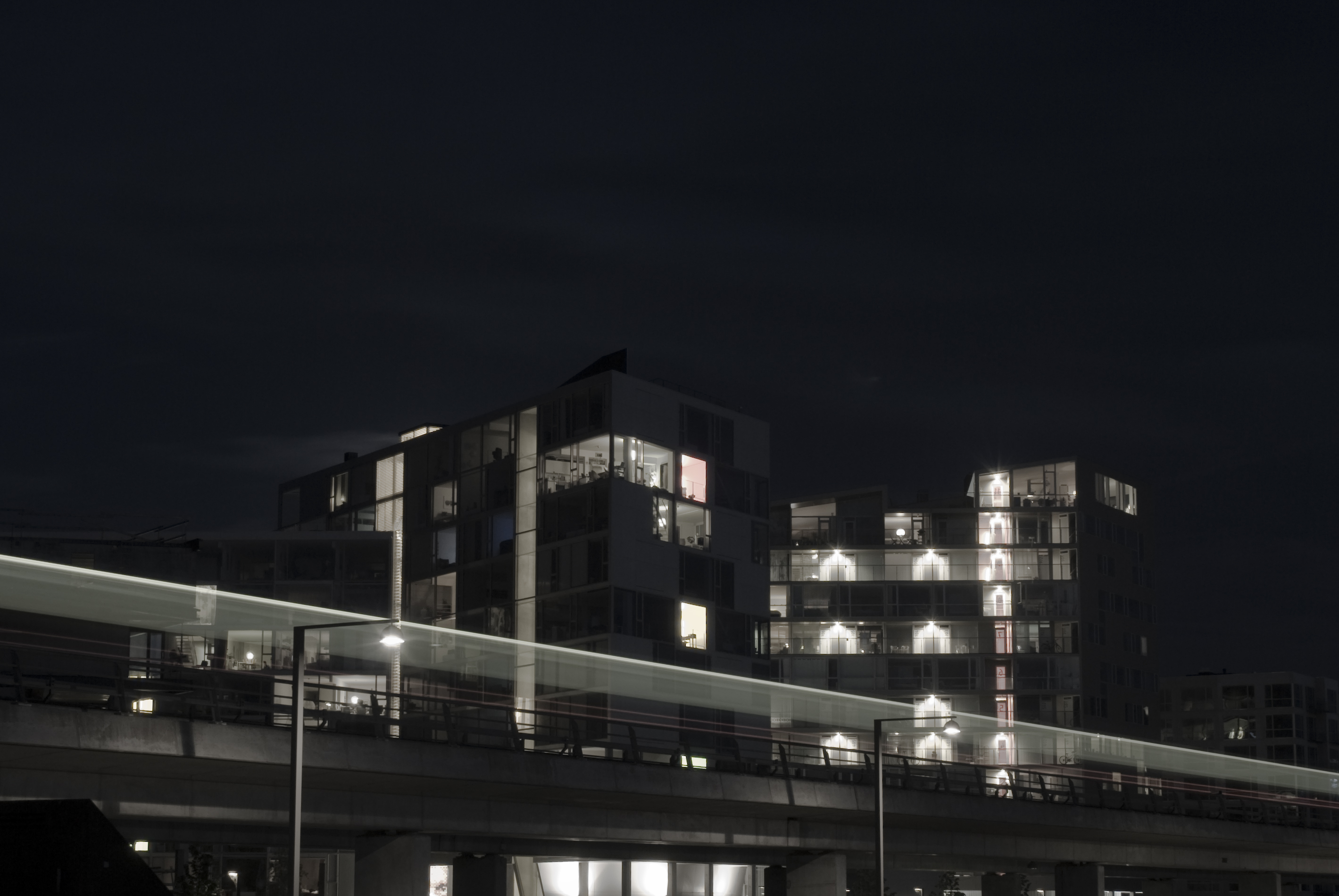 VM Husene Ørestad, Copenhagen